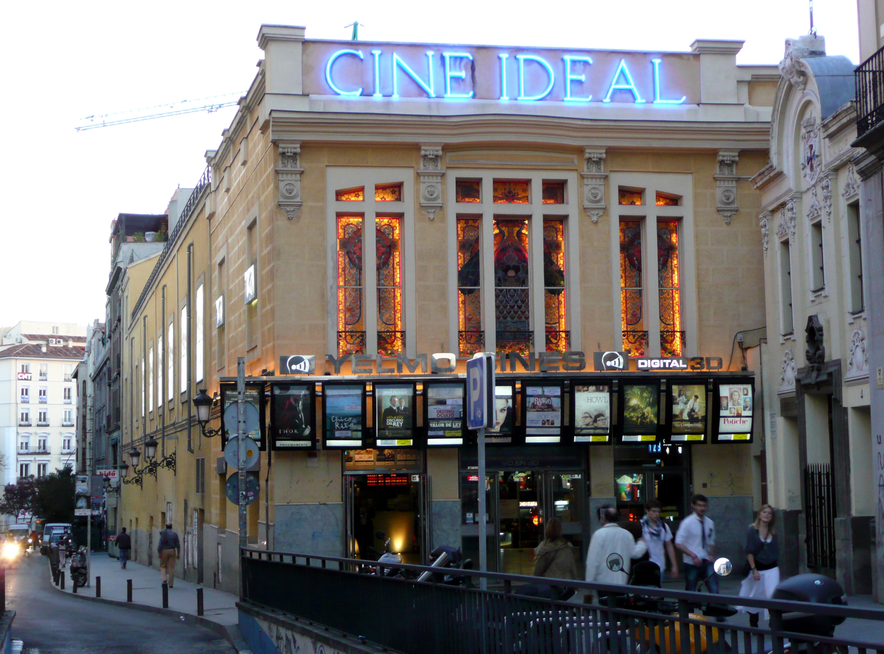 Madrid